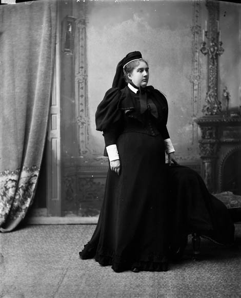 Lady Annie Thompson (née Affleck)